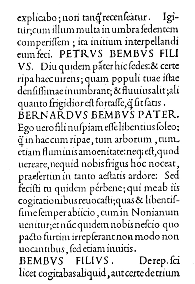 Originalsatz der Bembo mit langen Oberlängen aus De Aetna (Pietro Bembo: De Aetna. Venice: Aldus manutius, 1495.)